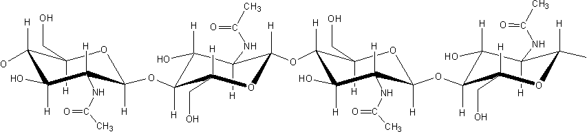 molécula de quitina